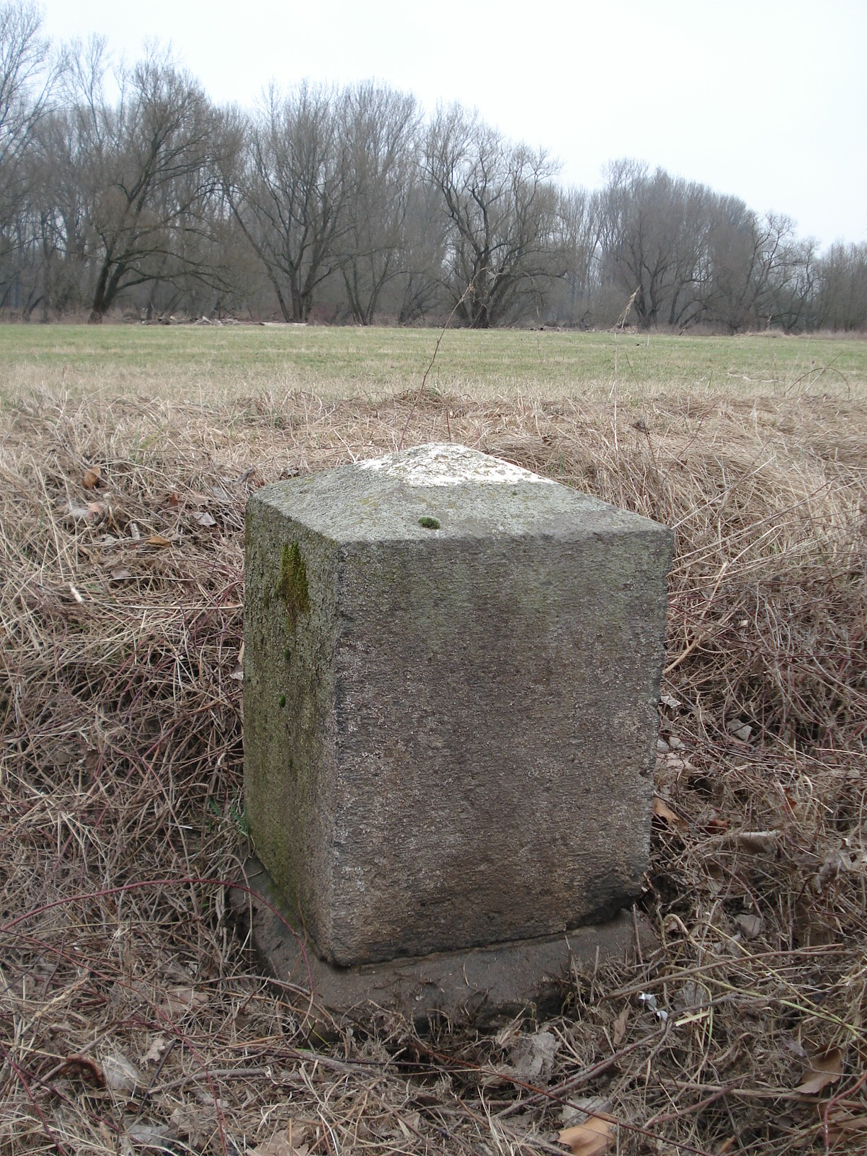 Myriameterstein 49, rechtsrheinisch, in Bonn-Geislar, Wasserseite